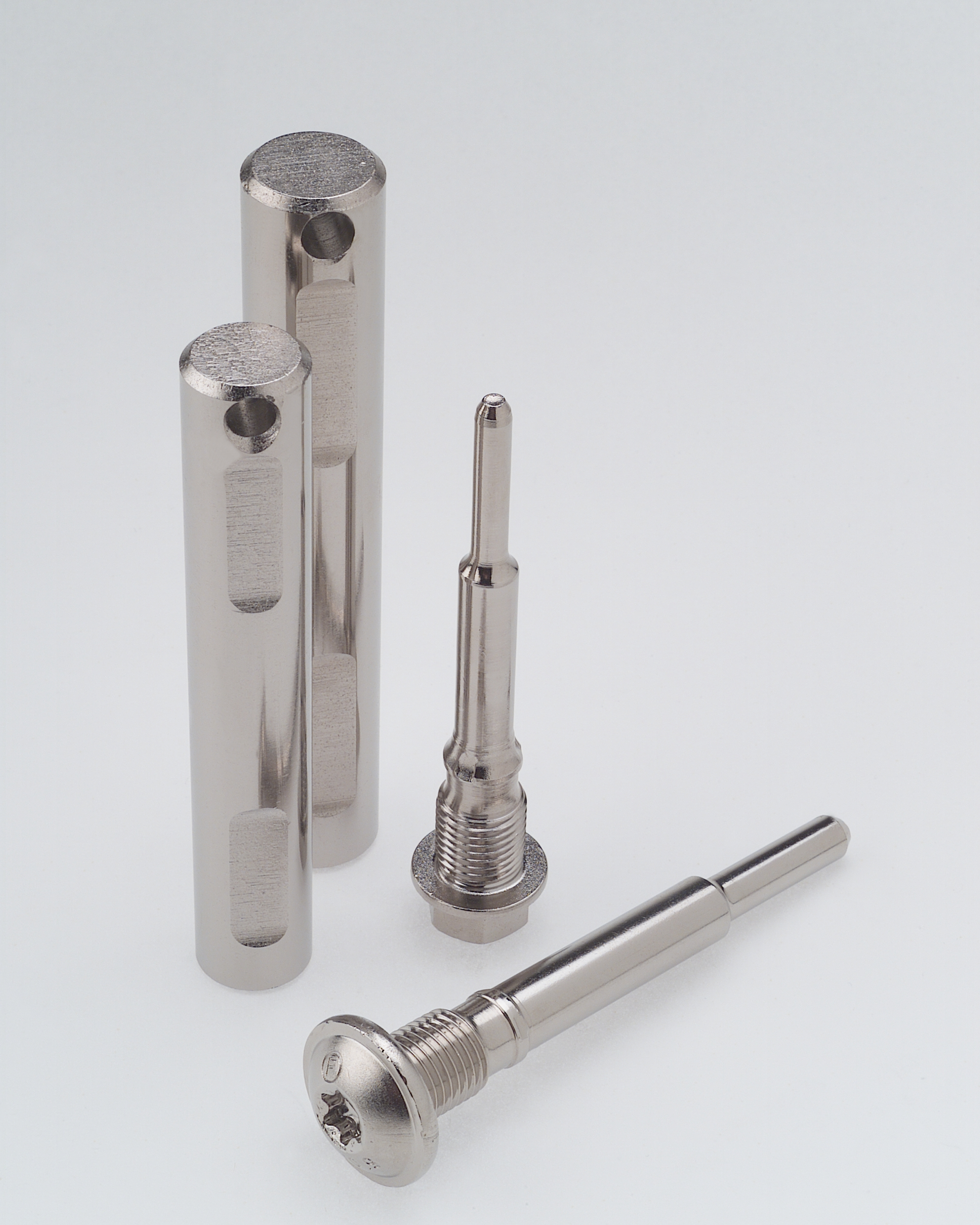 photos electroless nickel